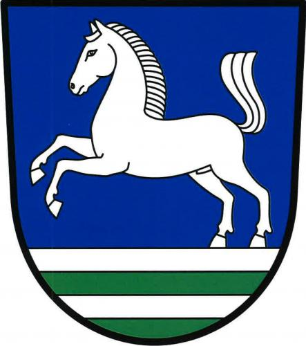 Hejnice, okres Ústí nad Orlicí, znak